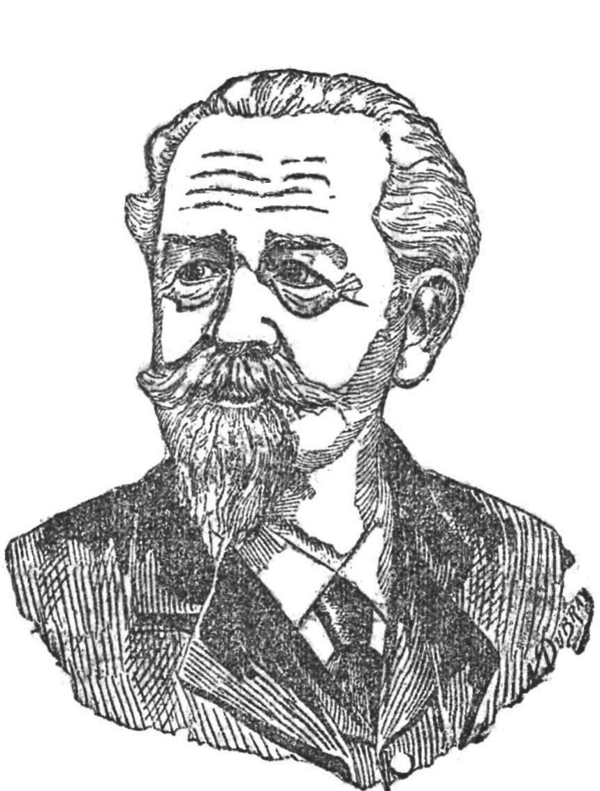 "Le Grandais".